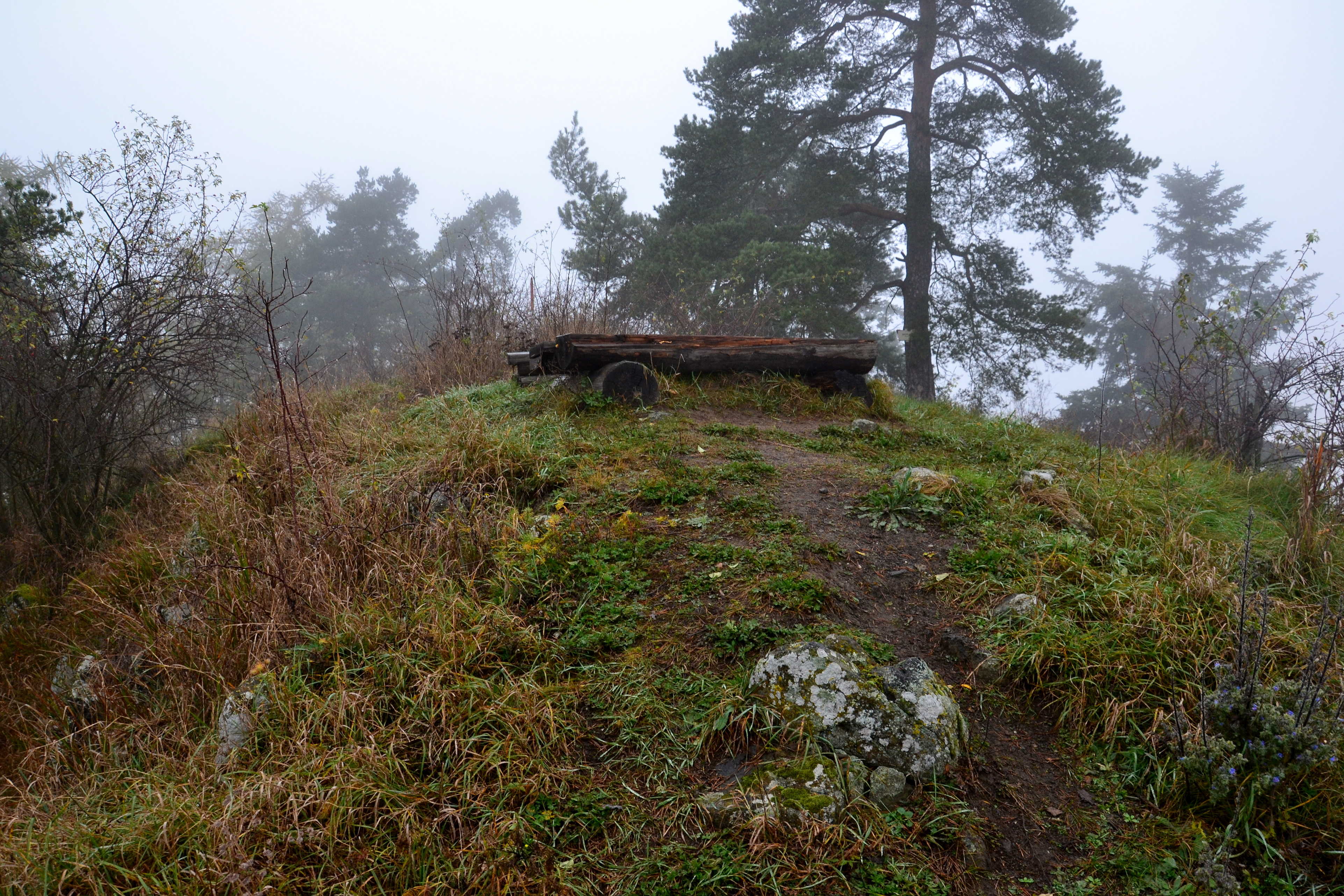 Hradní jádro